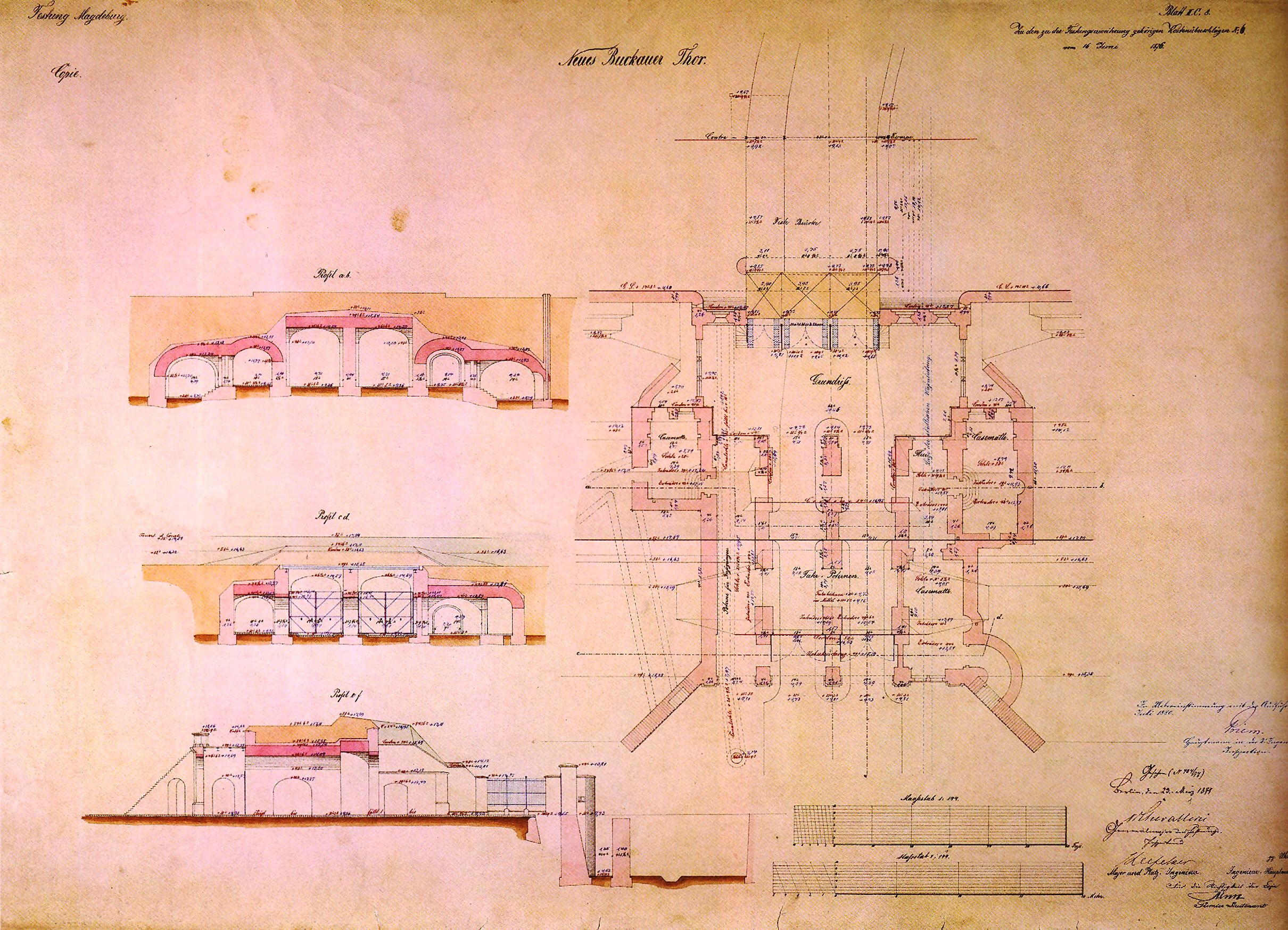 Grundriss und Schnitte des Buckauer Tores der Festung Magdeburg, erstellt für die Baukostenabrechnung